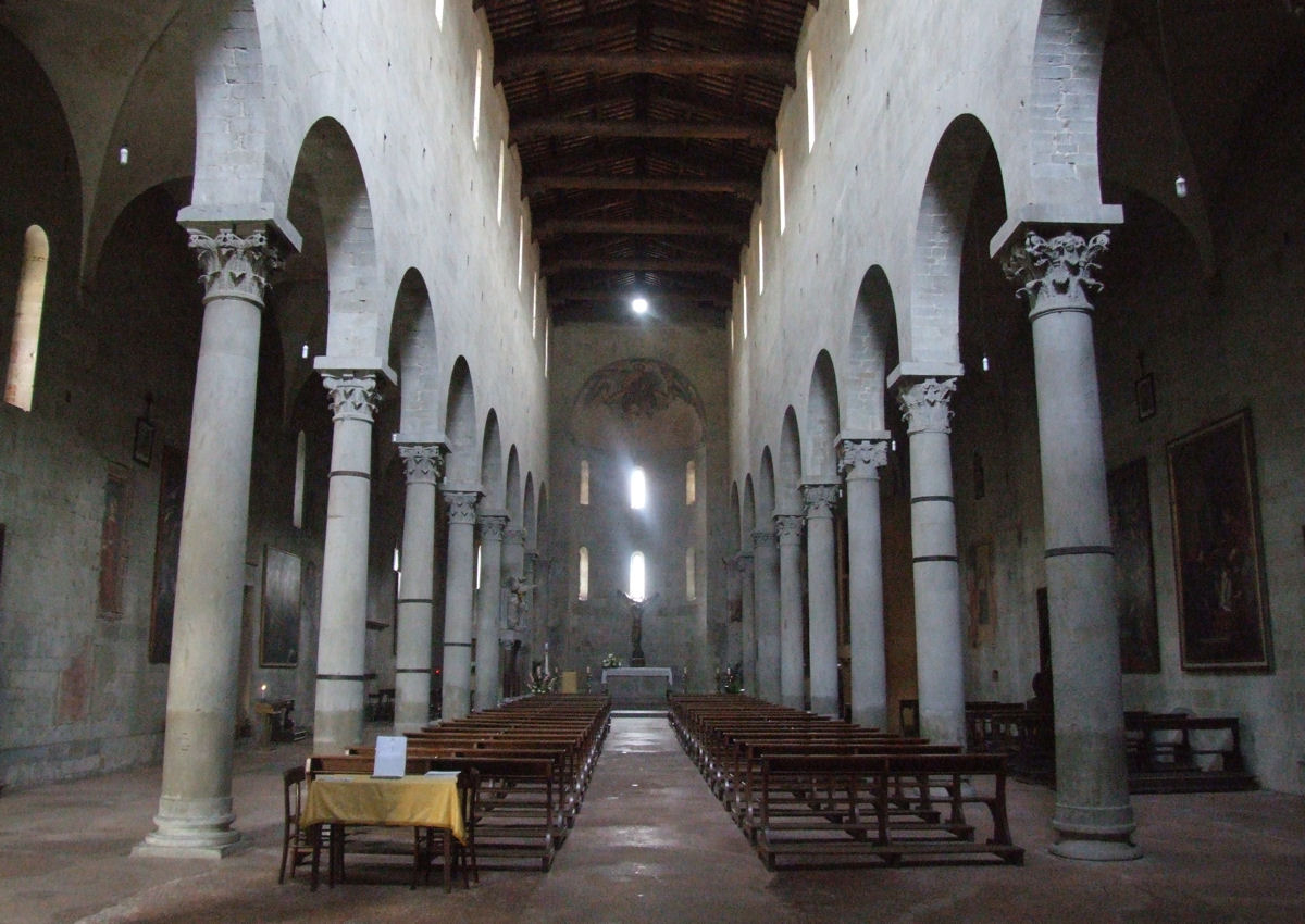 Chiesa Bartolomeo in Pantano, Pistoia, Italy